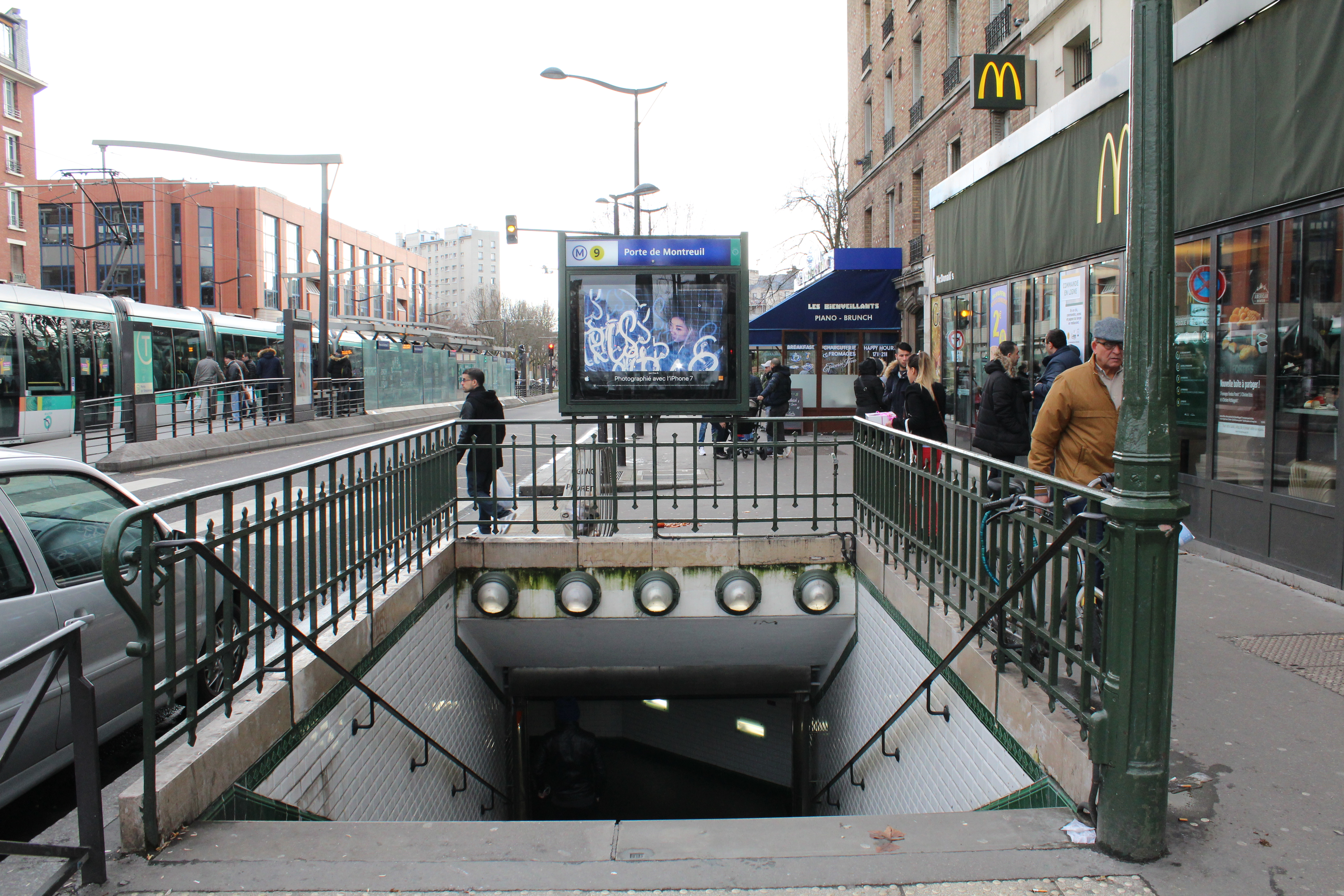 Entrée de la station de métro Porte de Montreuil à Paris.